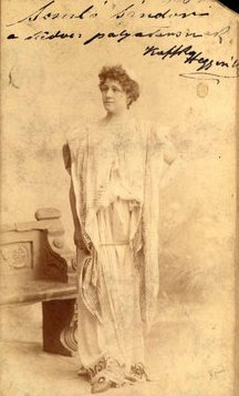 Madách Imre: Az ember tragédiája. Társulat: Nemzeti Színház. Bemutató: 1883.09.21. Rendező: Paulay Ede. Szereplő: Hegyesi Mari. A képes oldalon: "Somló Sándornak, a kedves pályatársnak Kaffka Hegyesi M."